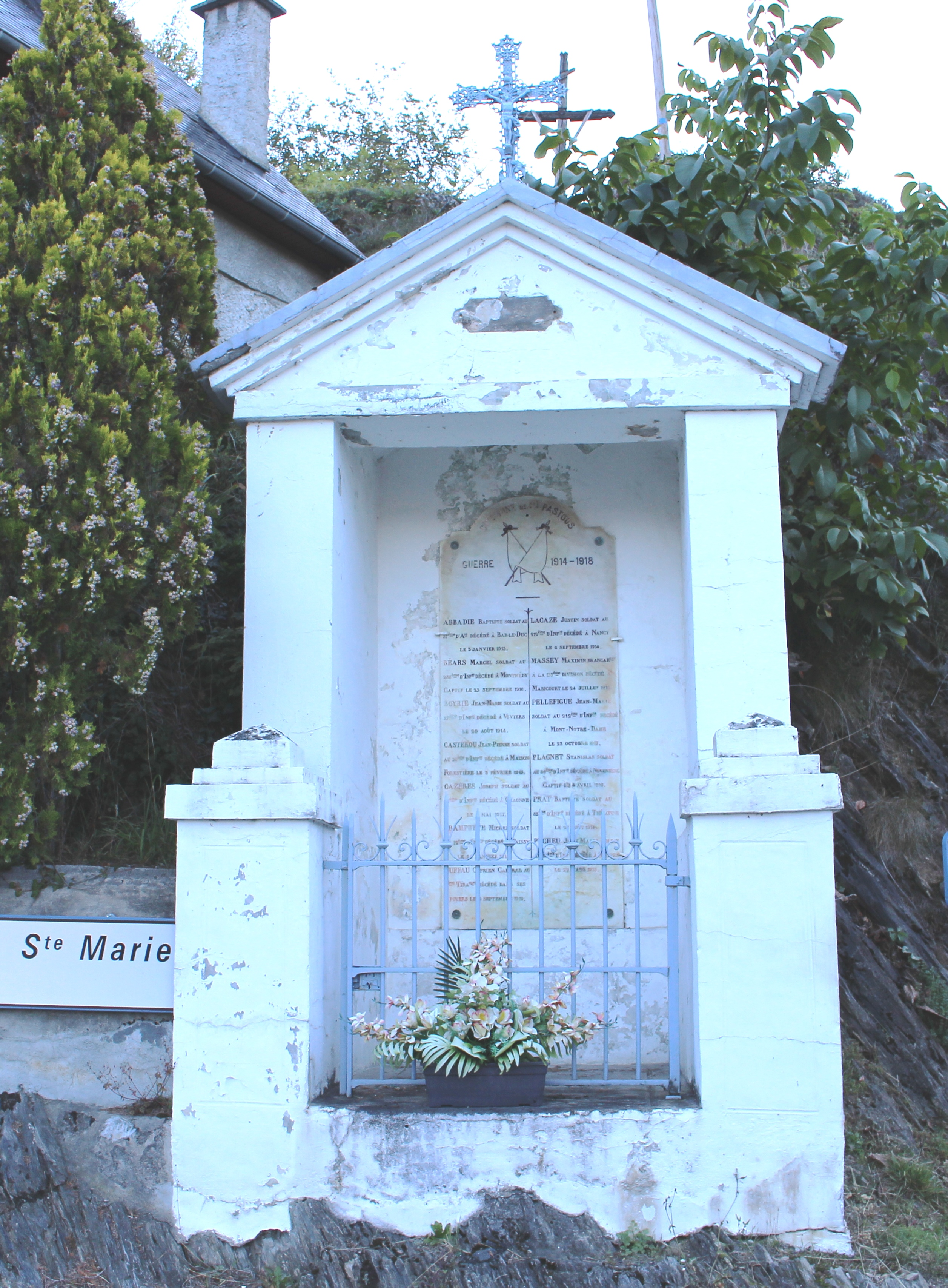 Monument aux morts de Saint-Pastous (Hautes-Pyrénées)